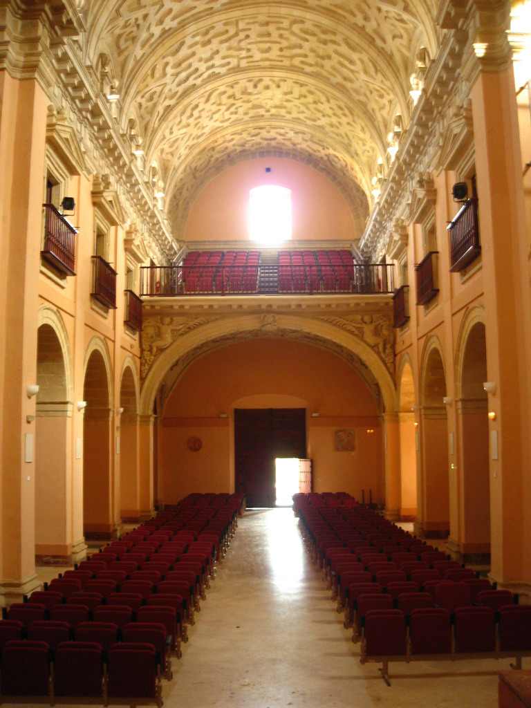 Interior de la Iglesia de la Merced de Sanlúcar de Barrameda, actualmente Auditorio Municipal.